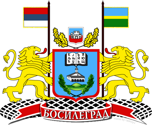 Blason de la ville de Bosilegrad en Serbie